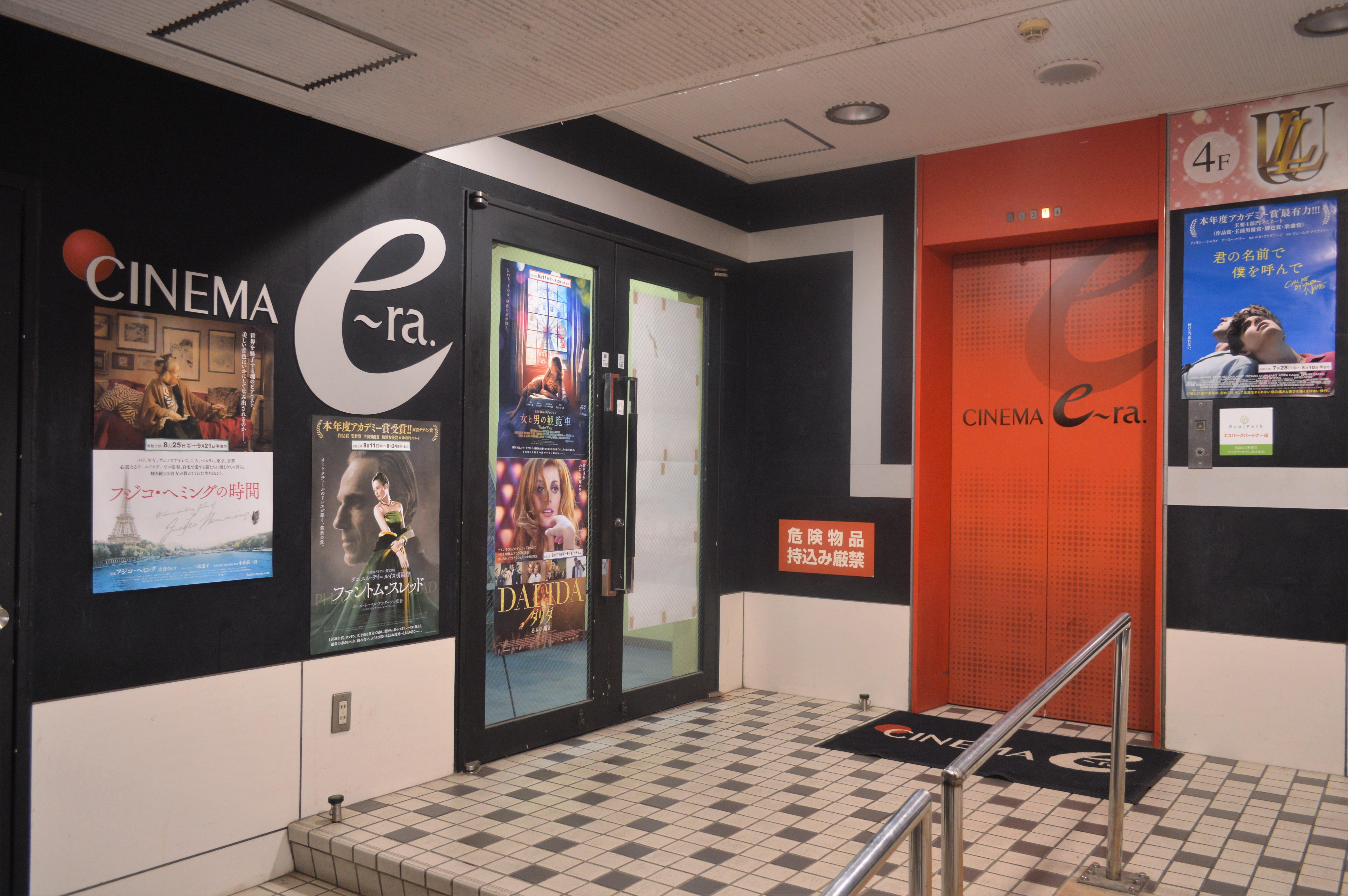 静岡県浜松市にある映画館「シネマイーラ」。